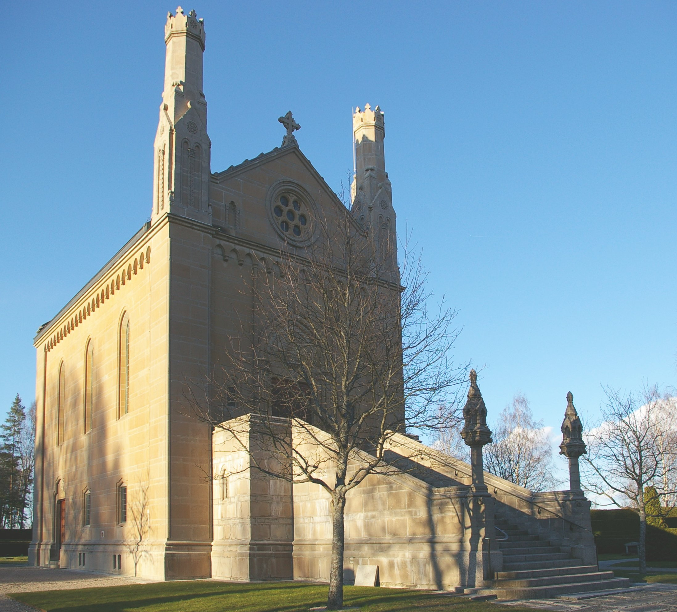 Gamla krematoriet, Norra kyrkogården, Örebro